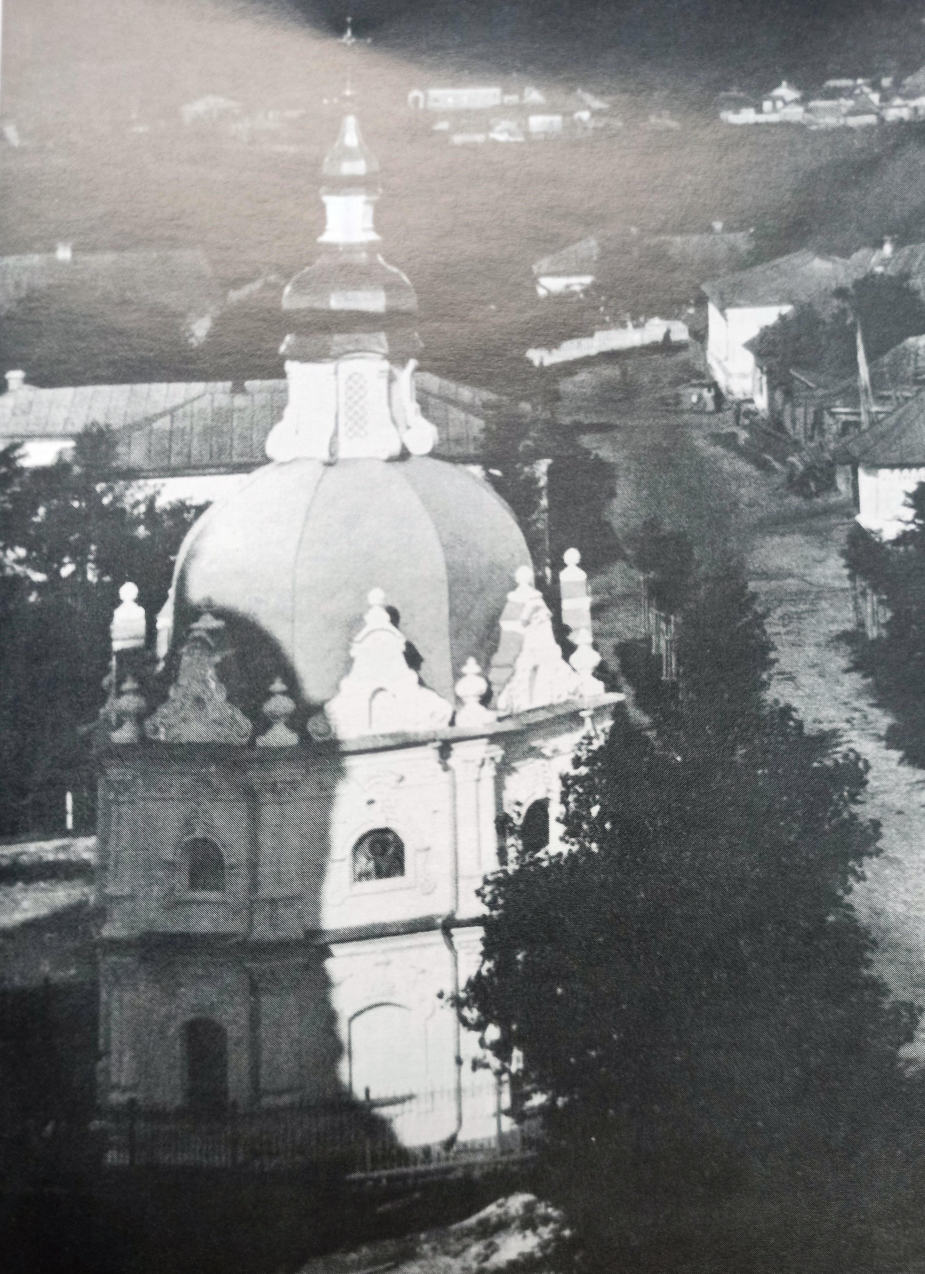 Анастасіївська каплиця (західний фасад) - вид з дзвіниці Спасо-Преображенської церкви